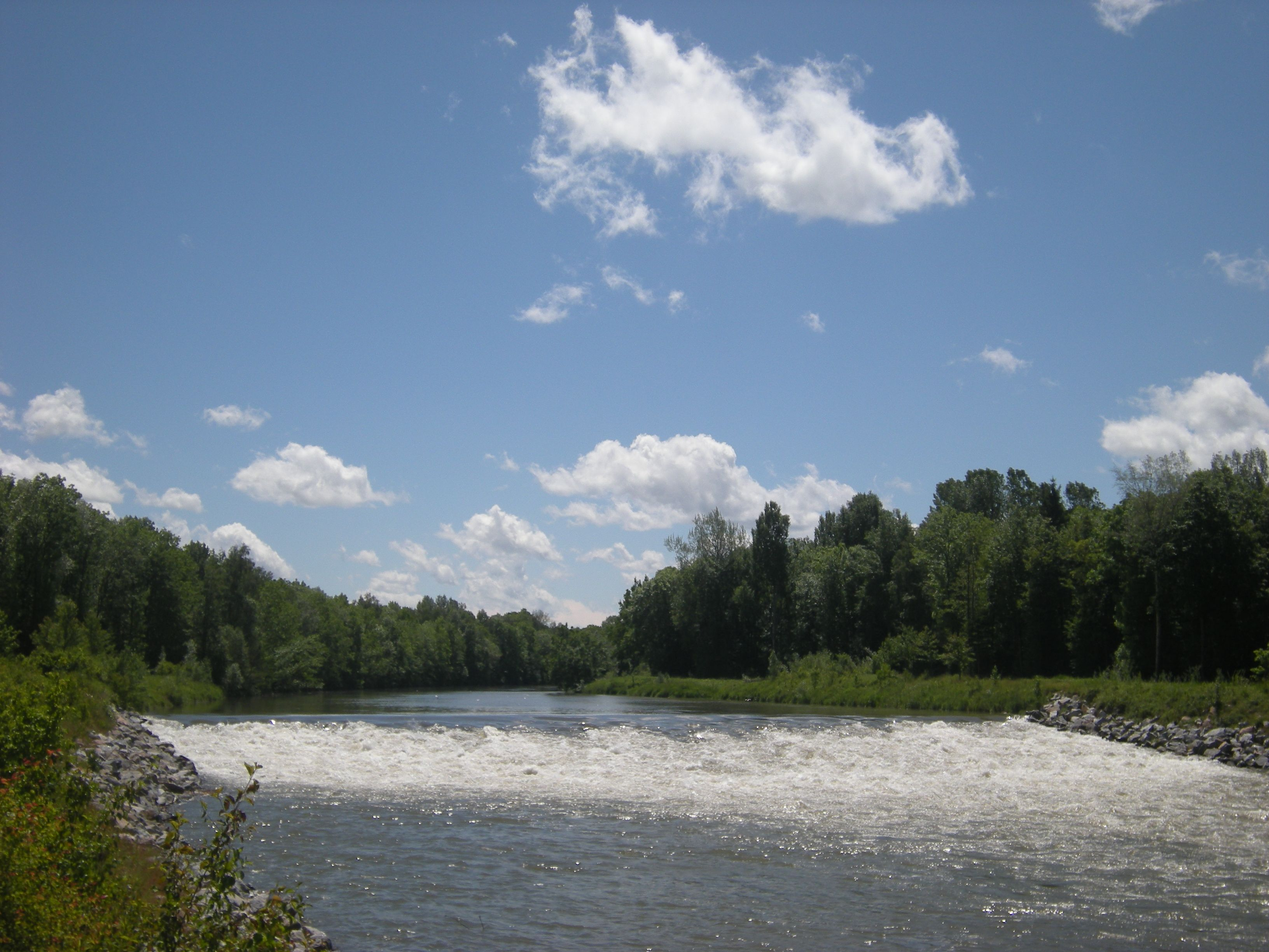 Rauhe Rampe - Fluss-Renaturierung Unteres Illertal, bei Flusskilometer 17